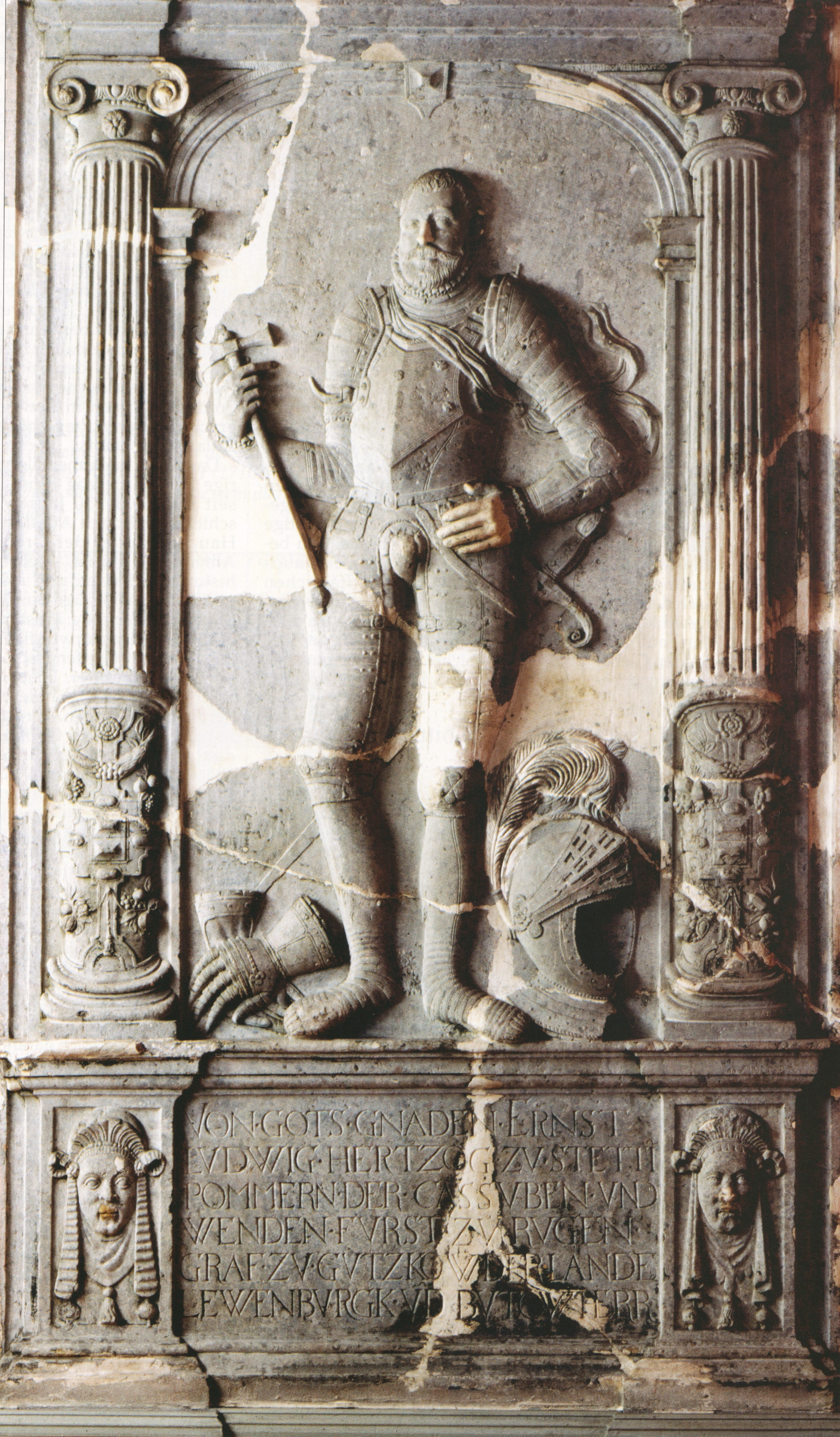 Reliefplatte Bildnis Herzog Ernst Ludwig von Pommern-Wolgast (1545–1592). In der Aula der Universität Greifswald, ursprünglich aus dem Wolgaster Herzogsschloss.